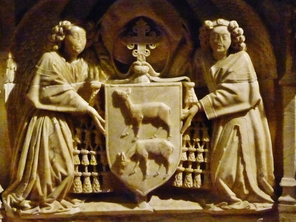 El sepulcro del cardenal Juan de Cervantes (1382-1453), que fue administrador apostólico de la archidiócesis de Sevilla y obispo de Ostia, Velletri, Ávila y Segovia, se halla en el interior de la capilla de San Hermenegildo de la catedral de Sevilla, (España), y fue esculpido por Lorenzo Mercadante de Bretaña aproximadamente entre los años 1453 y 1458, ya que en uno de los lados del sepulcro hay una inscripción que reza: «Lorenzo Mercadante de Bretaña entalló este bulto». Los cuatro lados del sepulcro están adornados con el escudo de armas del cardenal Cervantes, y la naturalidad en el rostro del prelado tal vez se deba a que posiblemente estuviera inspirado en la mascarilla funeraria del difunto.